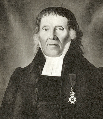 Martin Erik Ahlman (1773-1844)